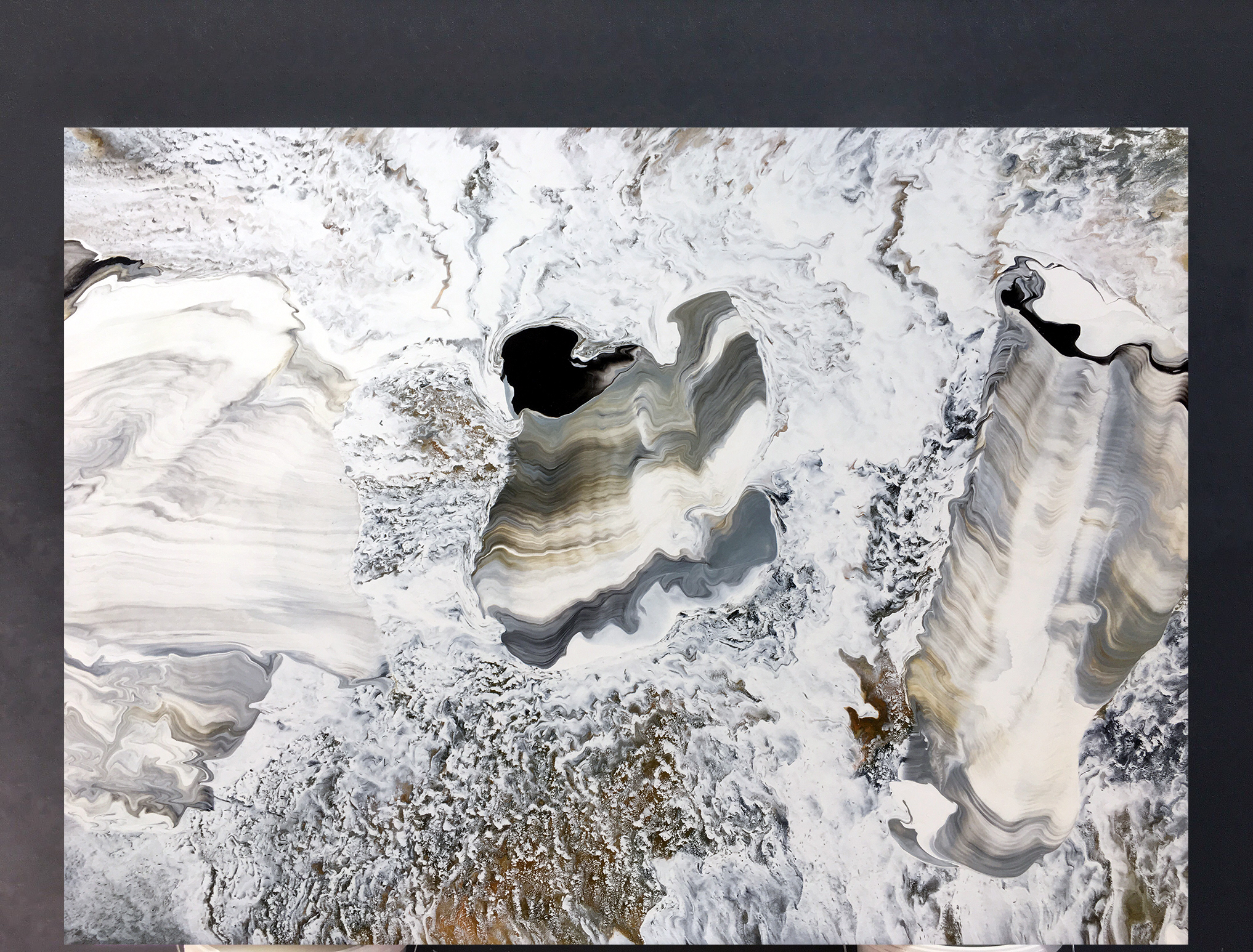 Impression 14, acrylique et élastomère sur toile de lin, 180x130 cm, 2019